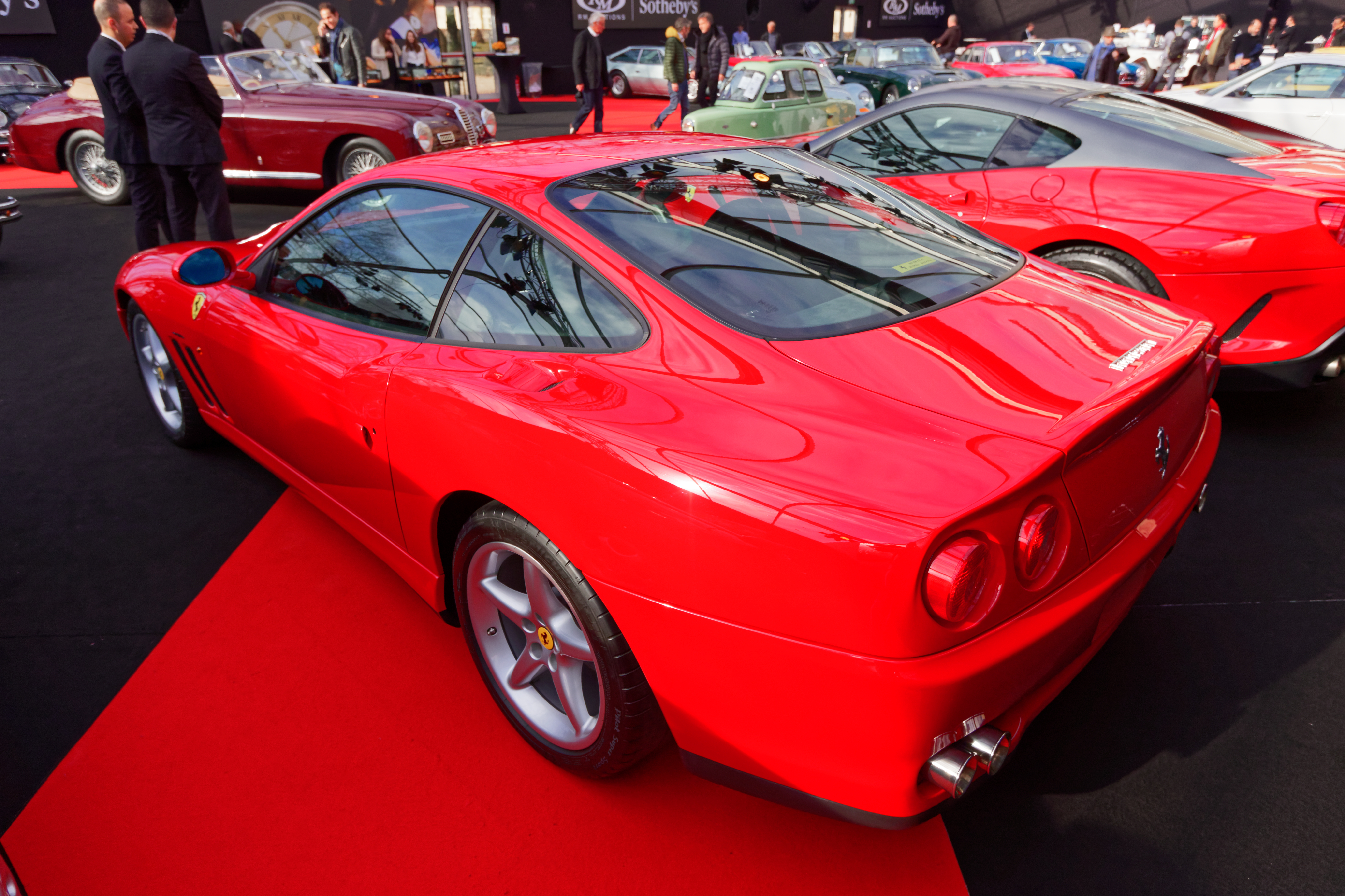 Une Ferrari 550 Maranello WSR de 2000 exposée lors de la vente RM Sotheby’s 2017 aux Invalides à Paris.